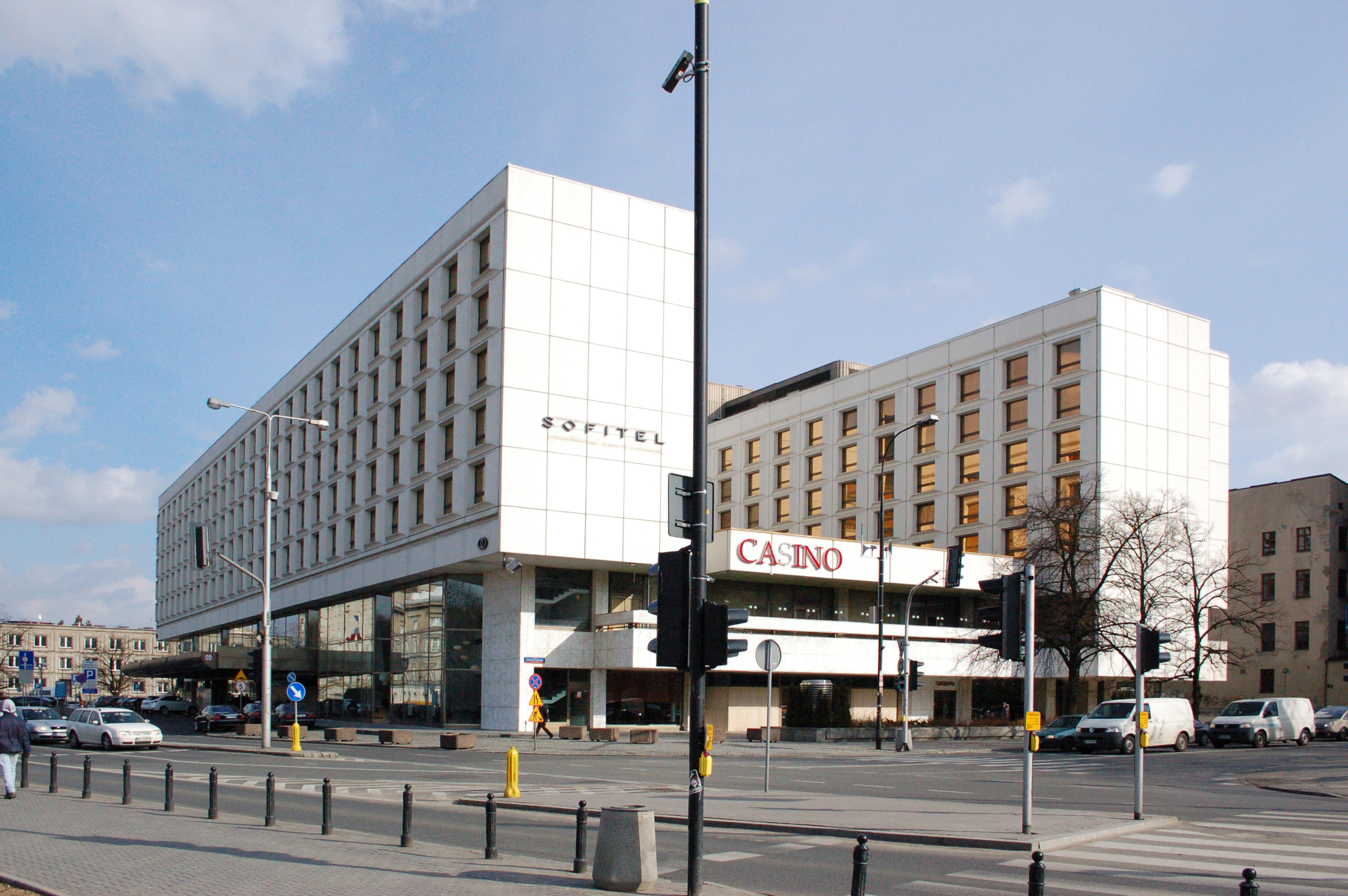 Hotel Victoria Warschau